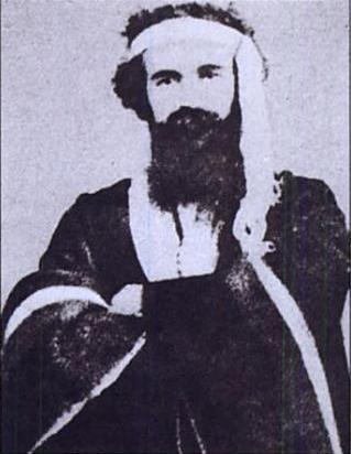 Orélie Antoine de Tounens (*La Chaise, Francia; 12 de mayo de 1825 - † Tourtoirac, Francia - 19 de septiembre de 1878) fue un aventurero francés de origen noble que pasó a la historia por proclamarse Rey y fundar el Reino de la Araucanía y la Patagonia, al sur de América del Sur.